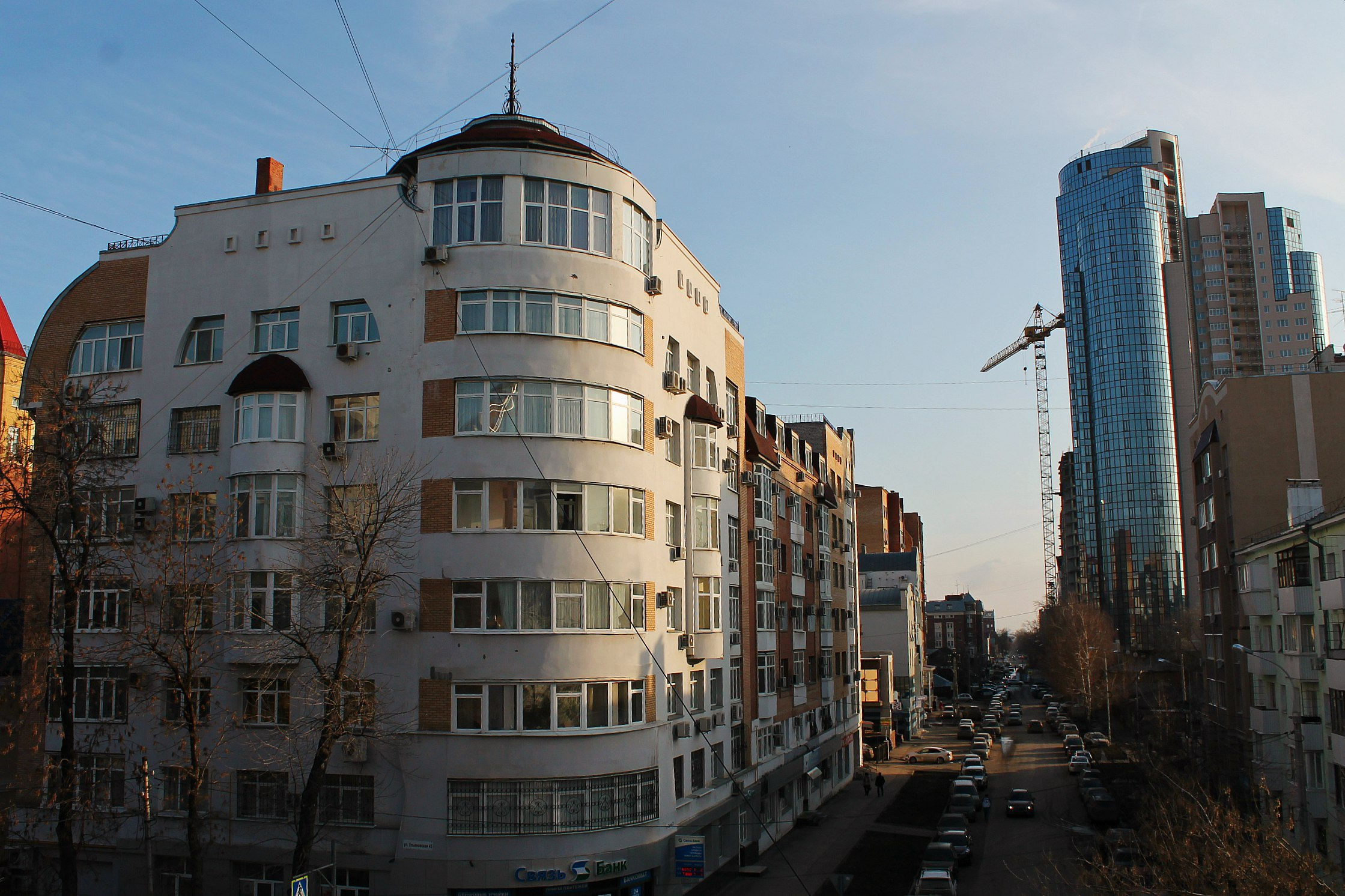 Пересечение улицы Садовой и Ульяновской